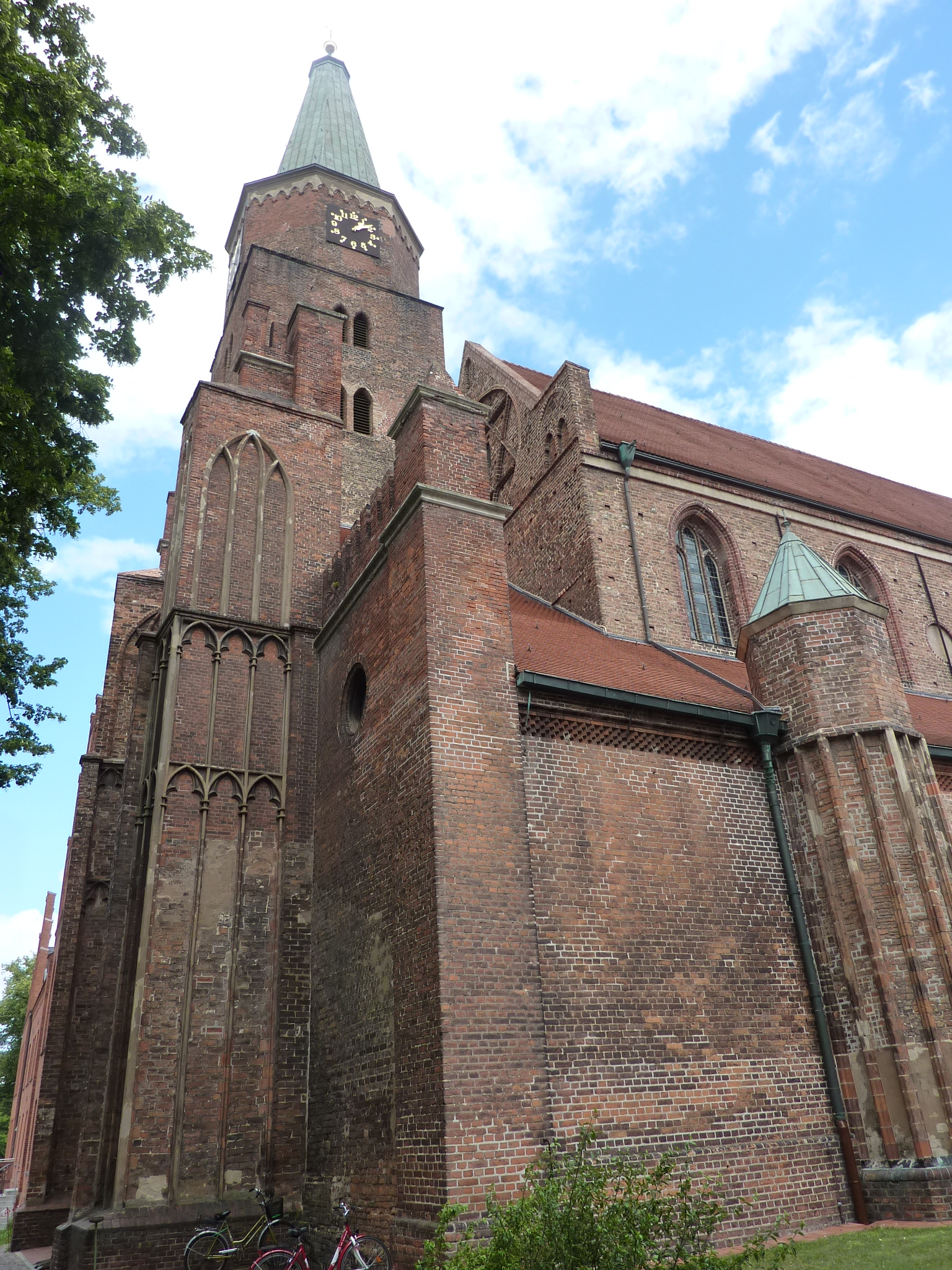 Dom St. Peter und Paul in Brandenburg an der Havel